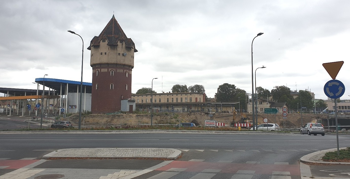 Stargard. Modernizacja wiaduktu, dworca PKP